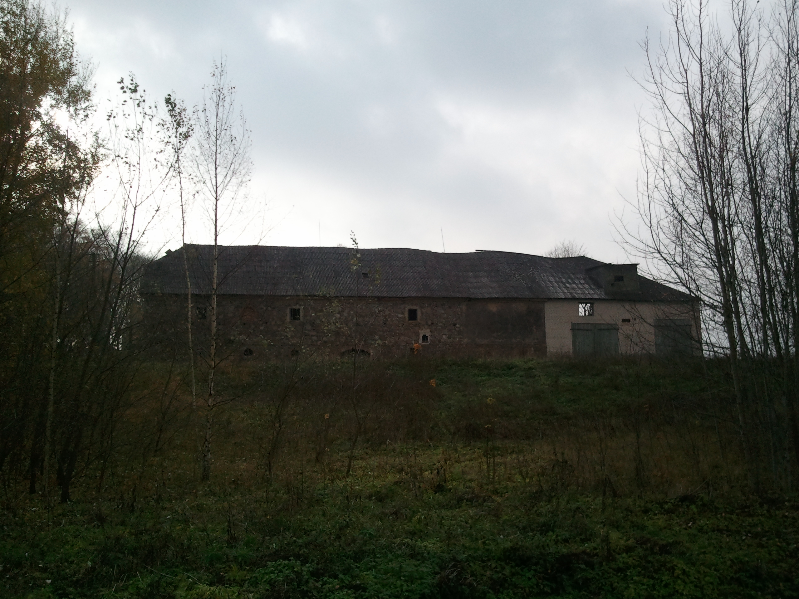 Degsnio dvaro svirnas (sandėlis)